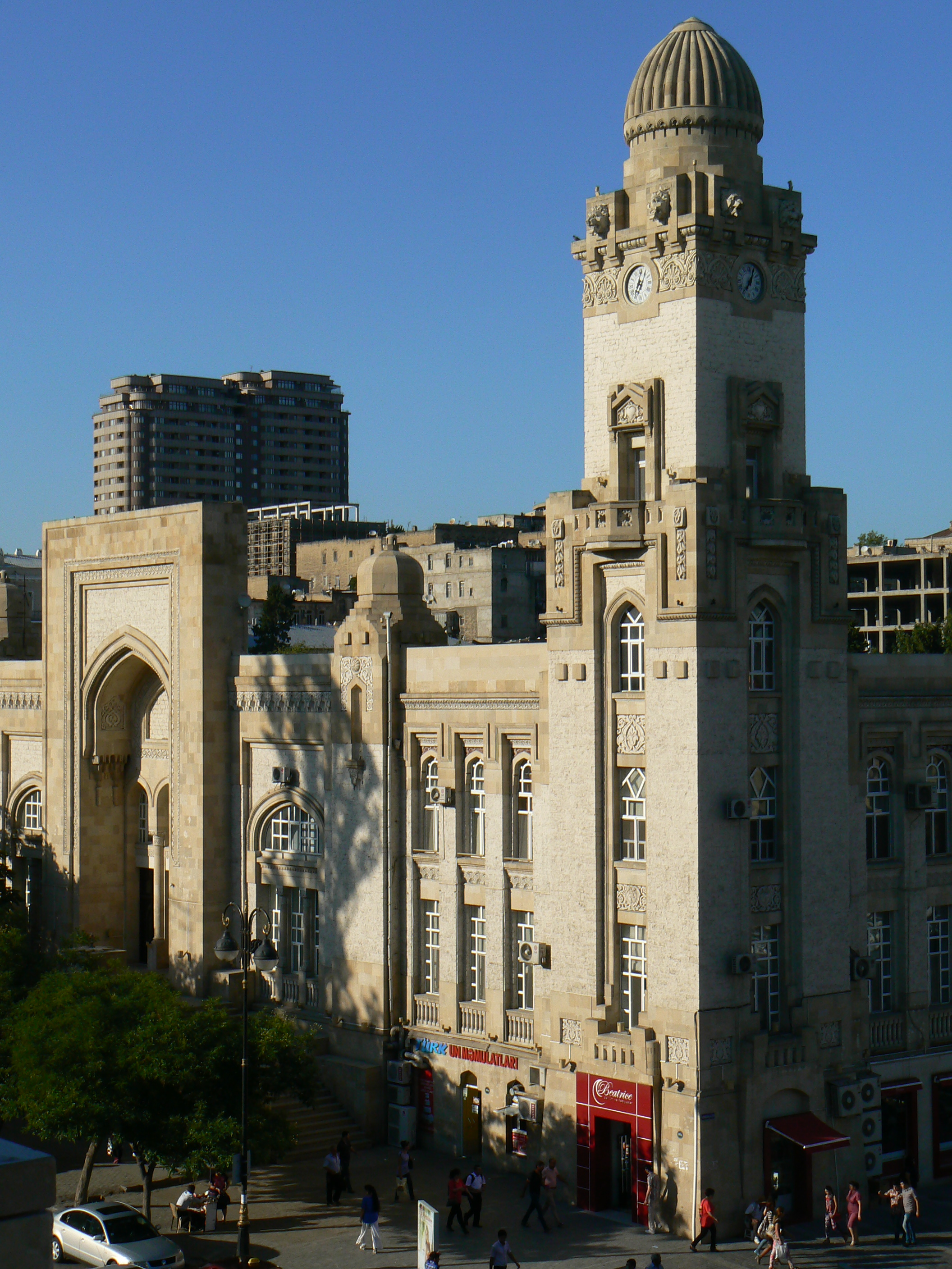 Elektrik dəmiryol vağzalının binası. 1926-cı il. Azadlıq prospekti, 22